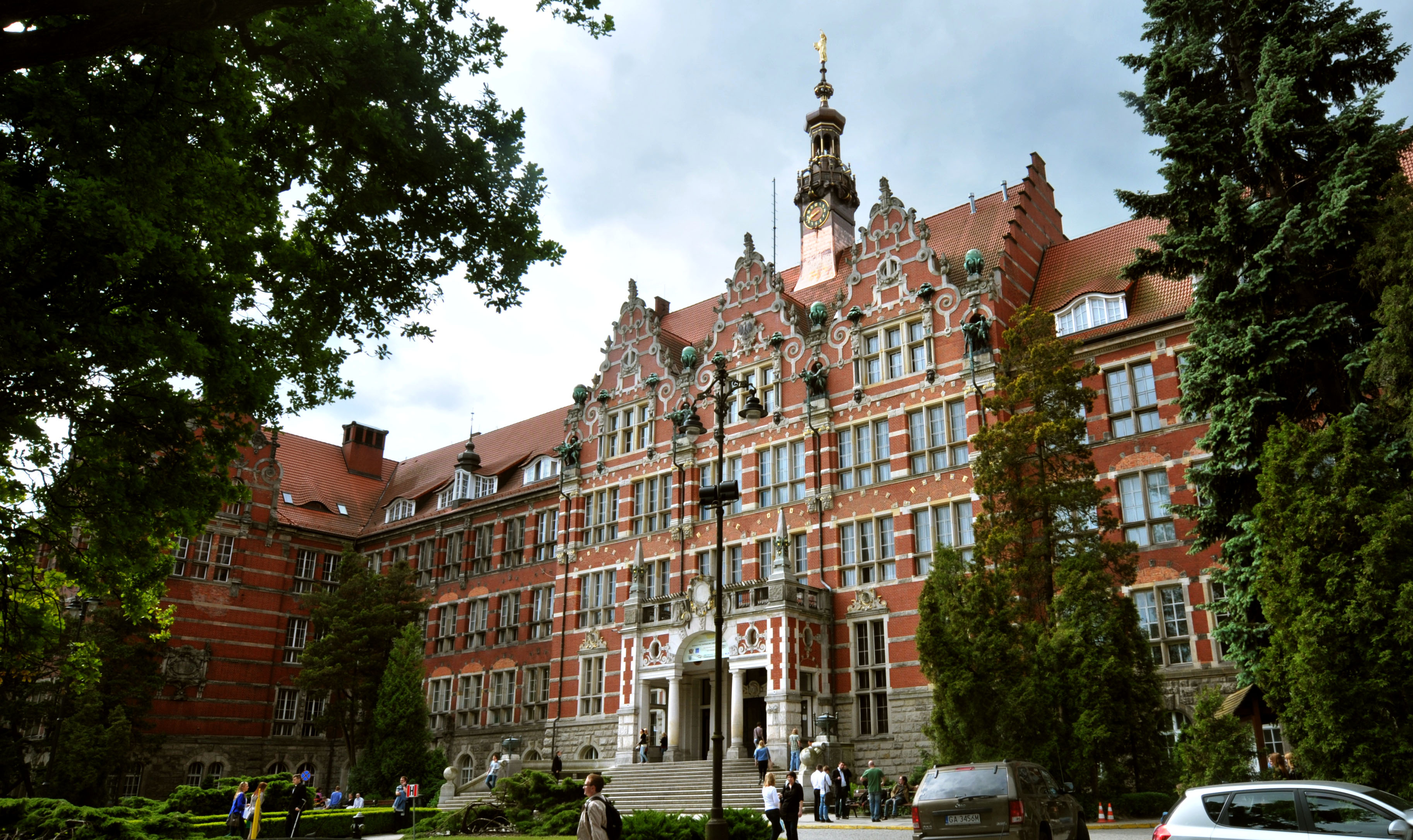 Politechnika Gdańska. Uczelniany Gmach Główny.